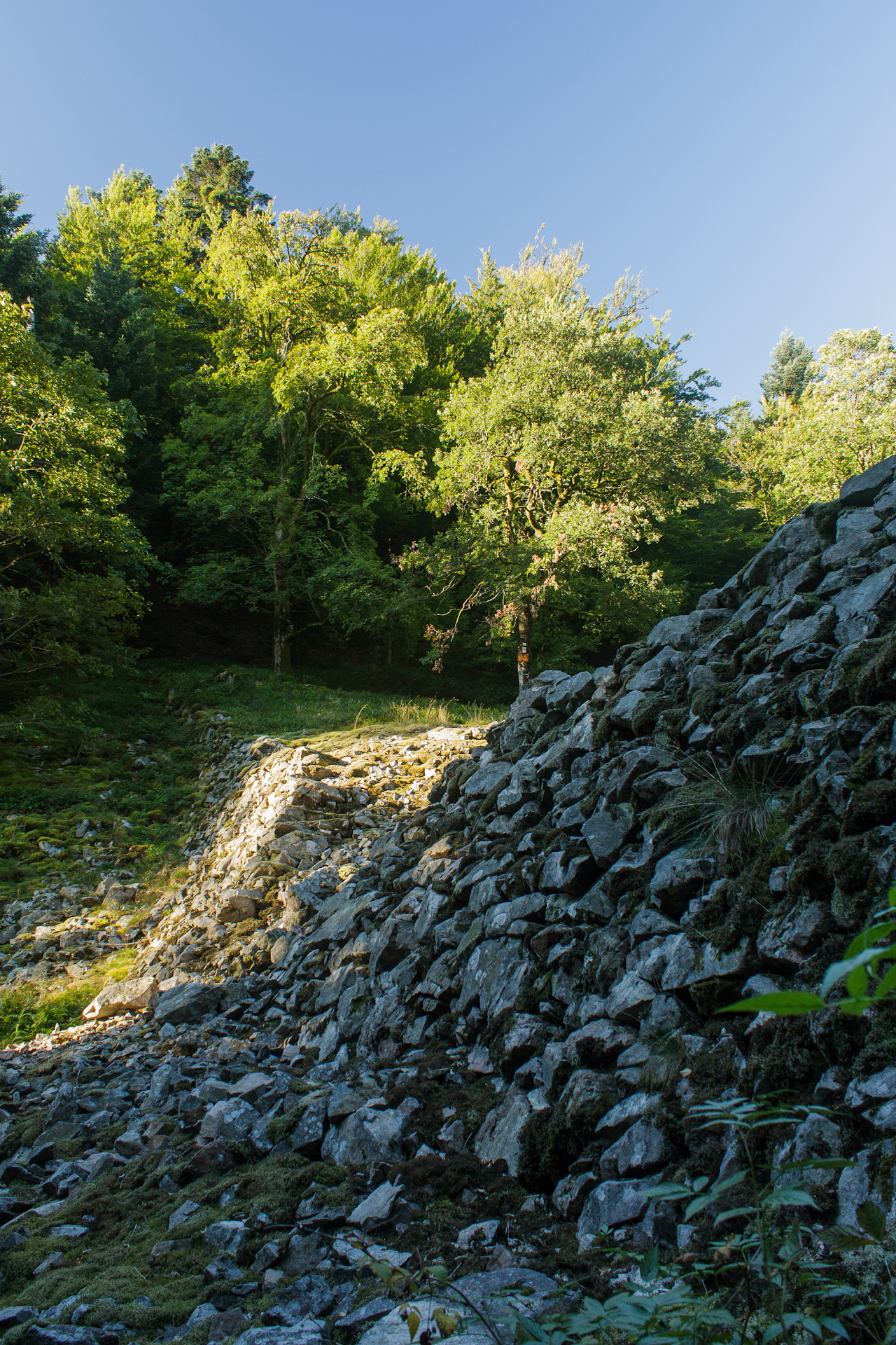 Pont des Fées à Saint-Etienne-lès-Remiremont / Saint-Amé, 48° 01′ 26″ Nord, 6° 38′ 01″ Est. L'ouvrage dit "Pont des Fées" (également sur commune de Saint-Amé), vestiges gallo-romains et d’époques postérieures, reliant le Morthomme et le Saint-Mont et rejoignant le plateau du Fossard par le Sentier des Moines, a été inscrit sur l'inventaire supplémentaire des monuments historiques par arrêté du 4 février 1988